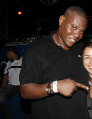 Eu,sapão,sapão e eu. srsrr hehehe EU E O MC SAPÃO